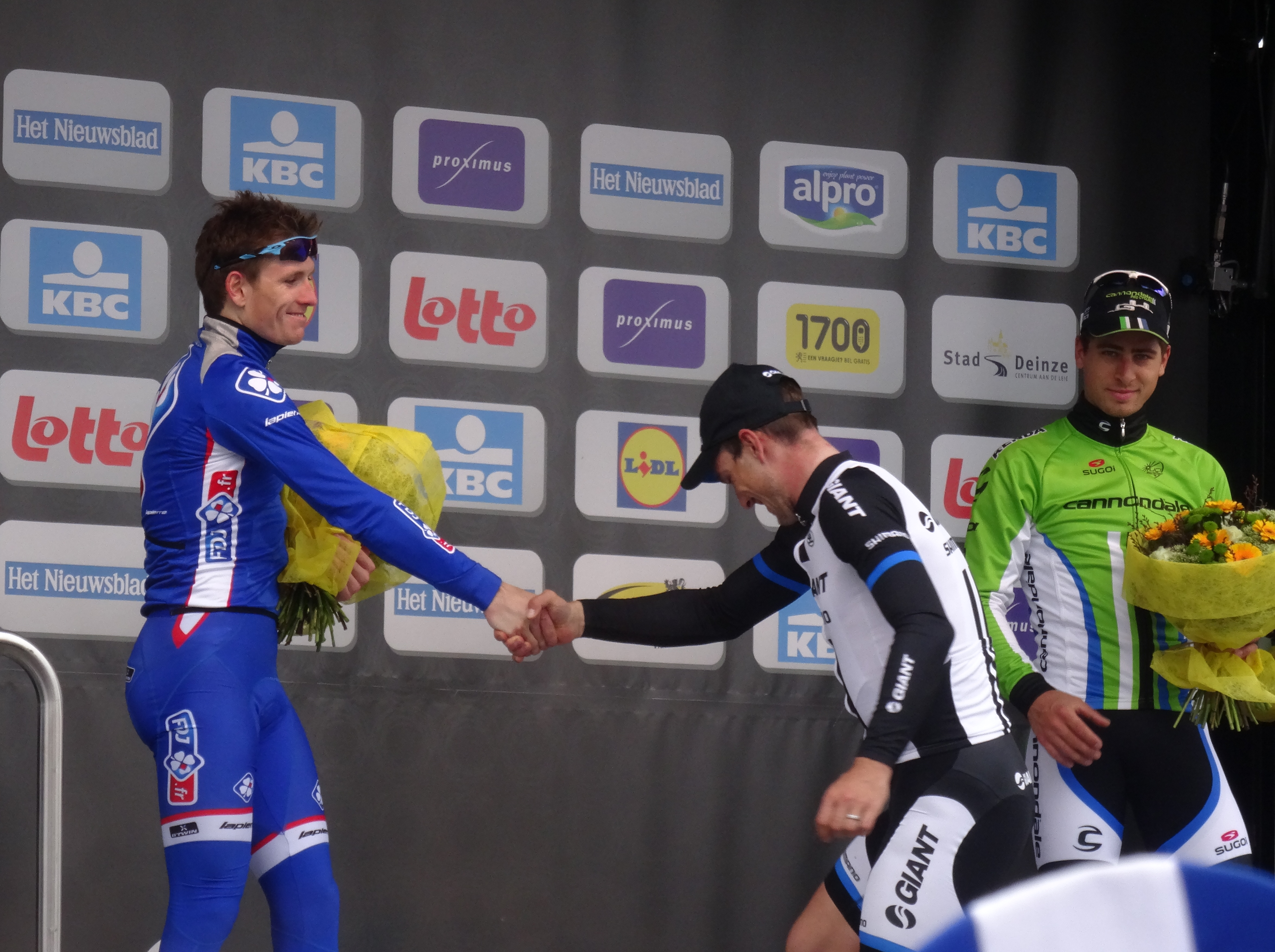 Reportage photographique réalisé le dimanche 30 mars à l'occasion de l'arrivée de Gand-Wevelgem 2014 à Wevelgem, Belgique.